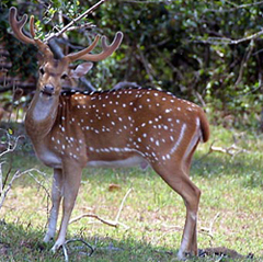 Sri lankan axis deer